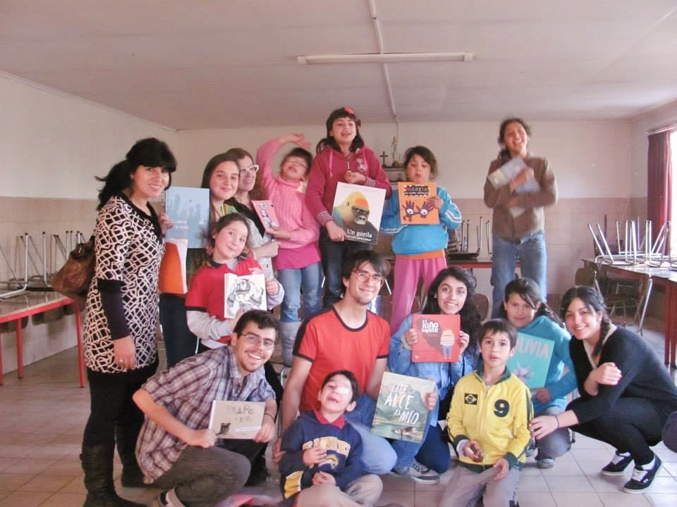 Visita a Recrea de escritora Sandra Comino